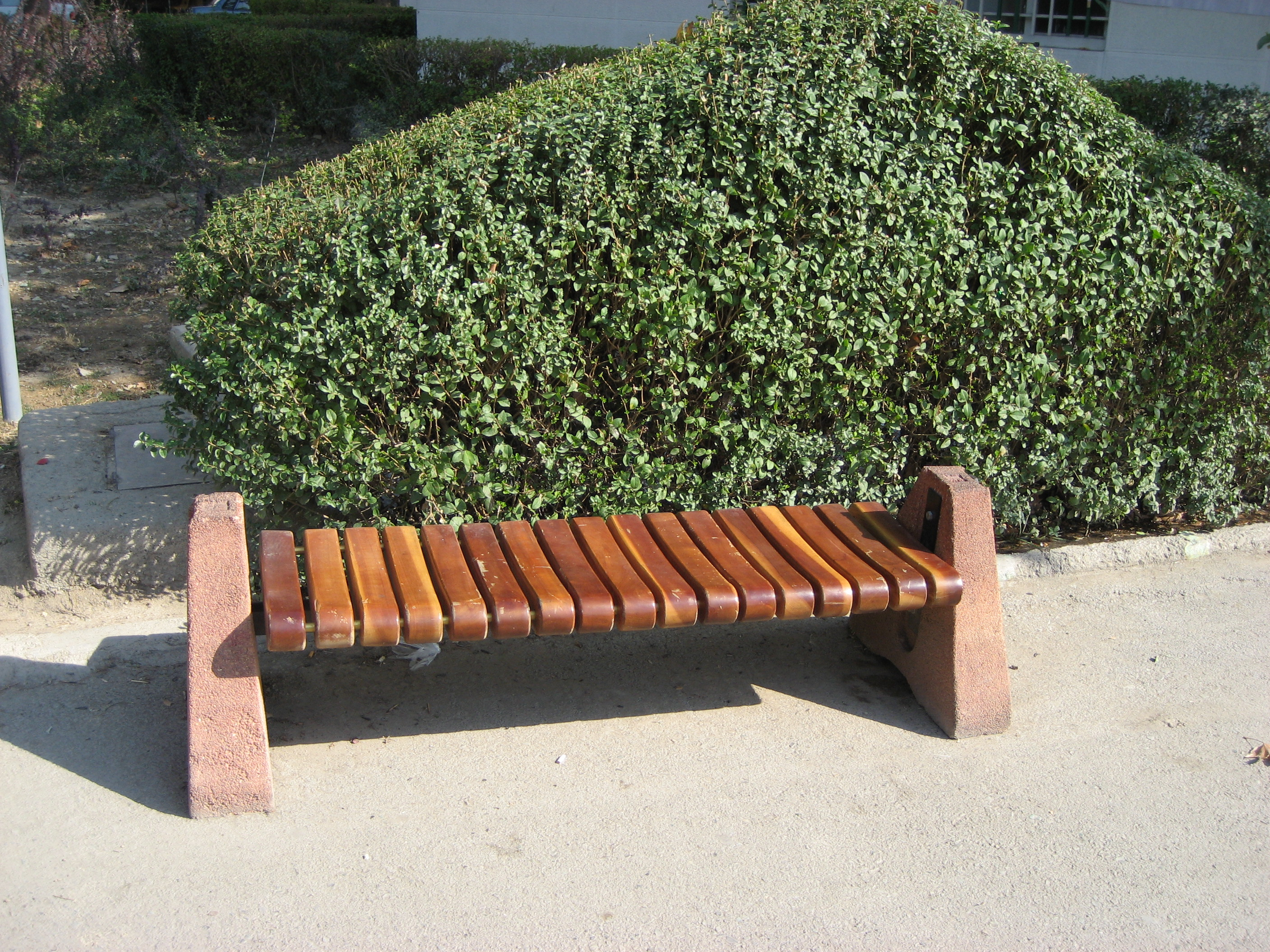 A bench in al-Mahdi Park, Southwestern Tehran